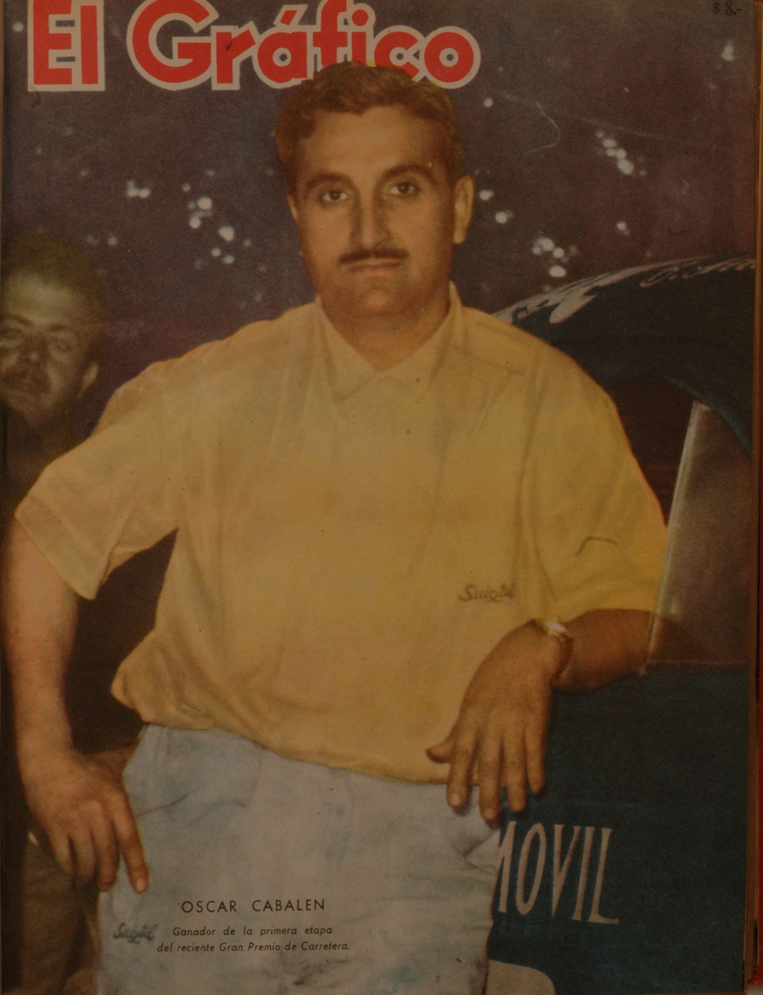 El Grafico del 23 de Diciembre de 1959. Edicion 2100